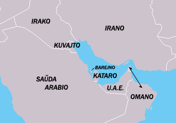 Modifita versio de